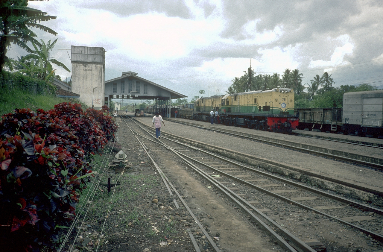 PTKACC201 (201 076 A)